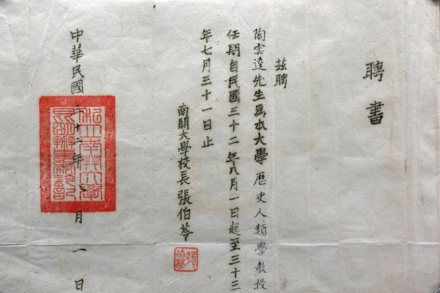 中文（中国大陆）: 南开大学张伯苓致陶云逵聘书